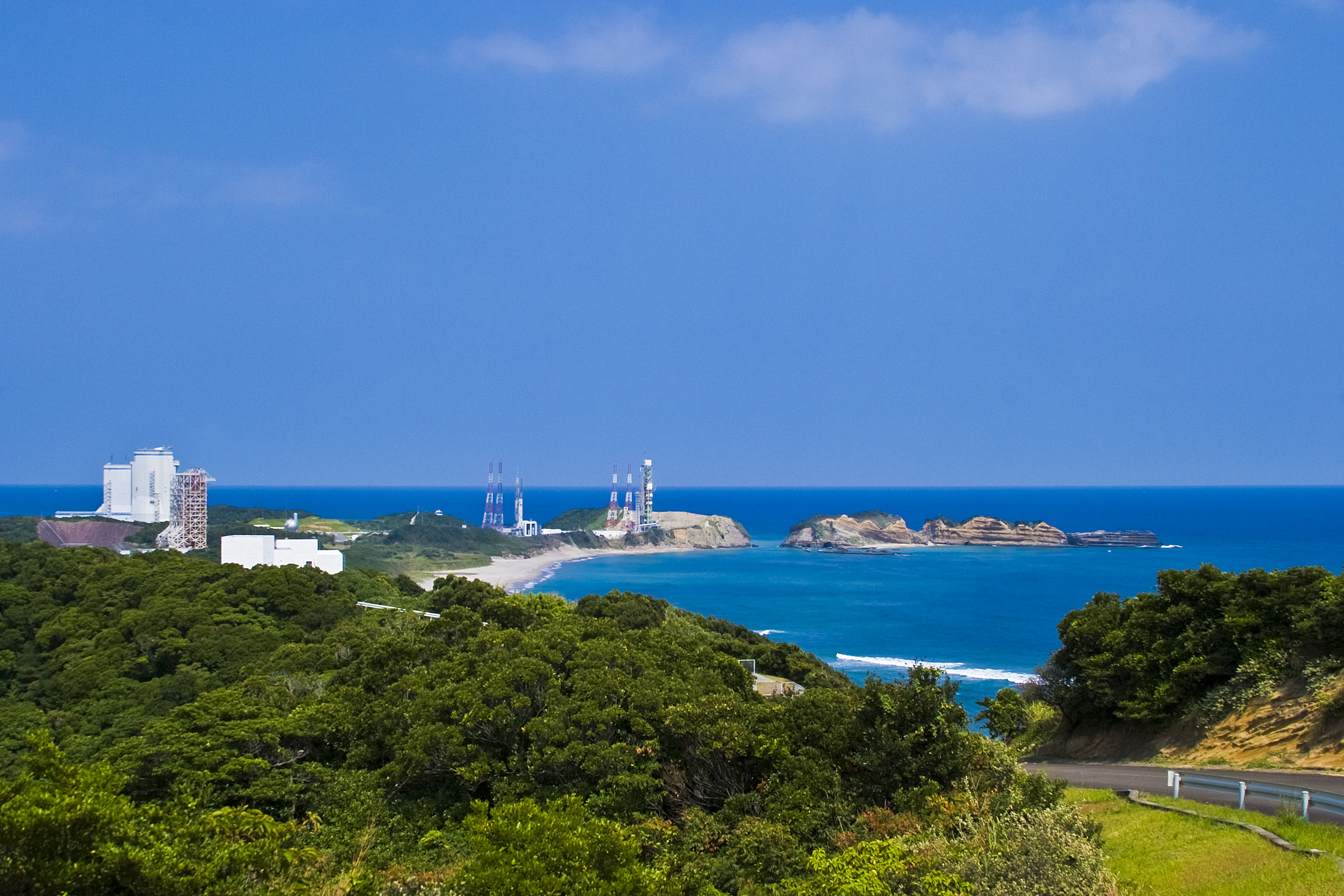 緑の山と珊瑚礁の海に囲まれた大崎射場を望む。